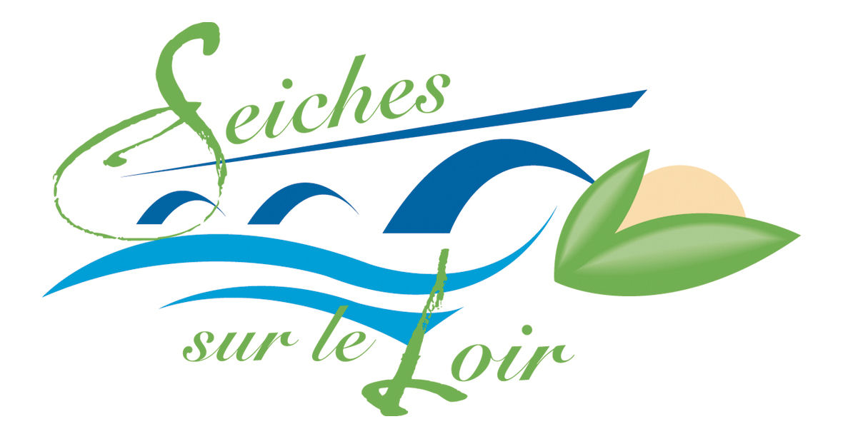 Logo de la ville de seiches sur le loir